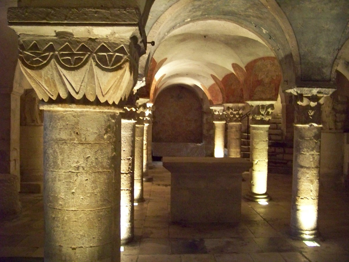 Crypte de la cathédrale Notre-Dame, Bayeux, Normandie, France